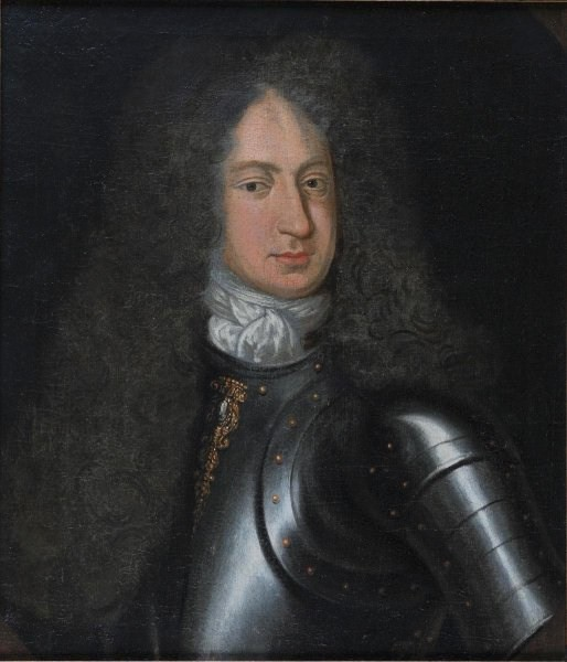 Porträt des jugendlichen, späteren preußischen Generalfeldmarschalls Hans (Johann) von Lehwaldt (* 24. Juni 1685 in Legitten, Landkreis Labiau; † 16. November 1768 in Königsberg), seit 4. Februar 1744 Ritter des Ordens vom Schwarzen Adler